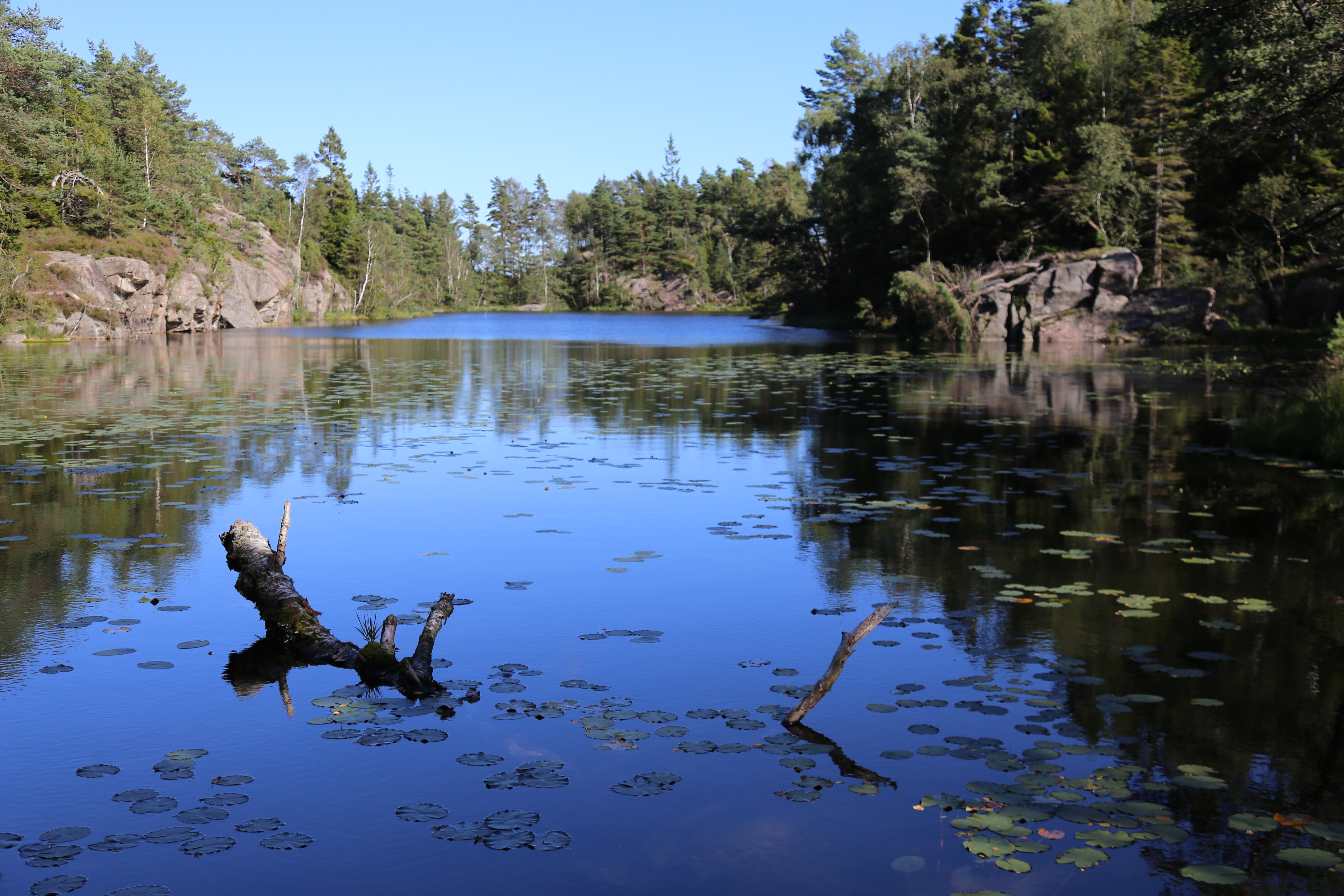 Vy över Bråvatten i Stenungsunds kommun från viken längst österut.